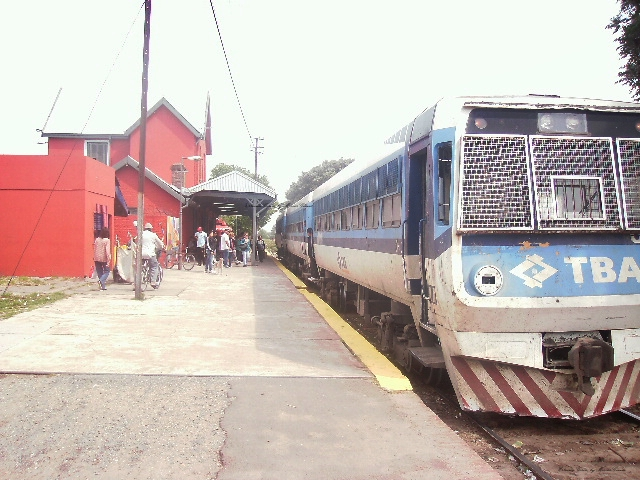 Estación Garín en partido de Escobar la misma perteneciente Ferrocarril Mitre del ramal a Capilla del Señor.